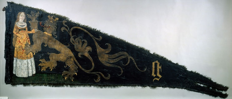 Flag of the City of Ghent. Bijokemuseum, Ghent other version